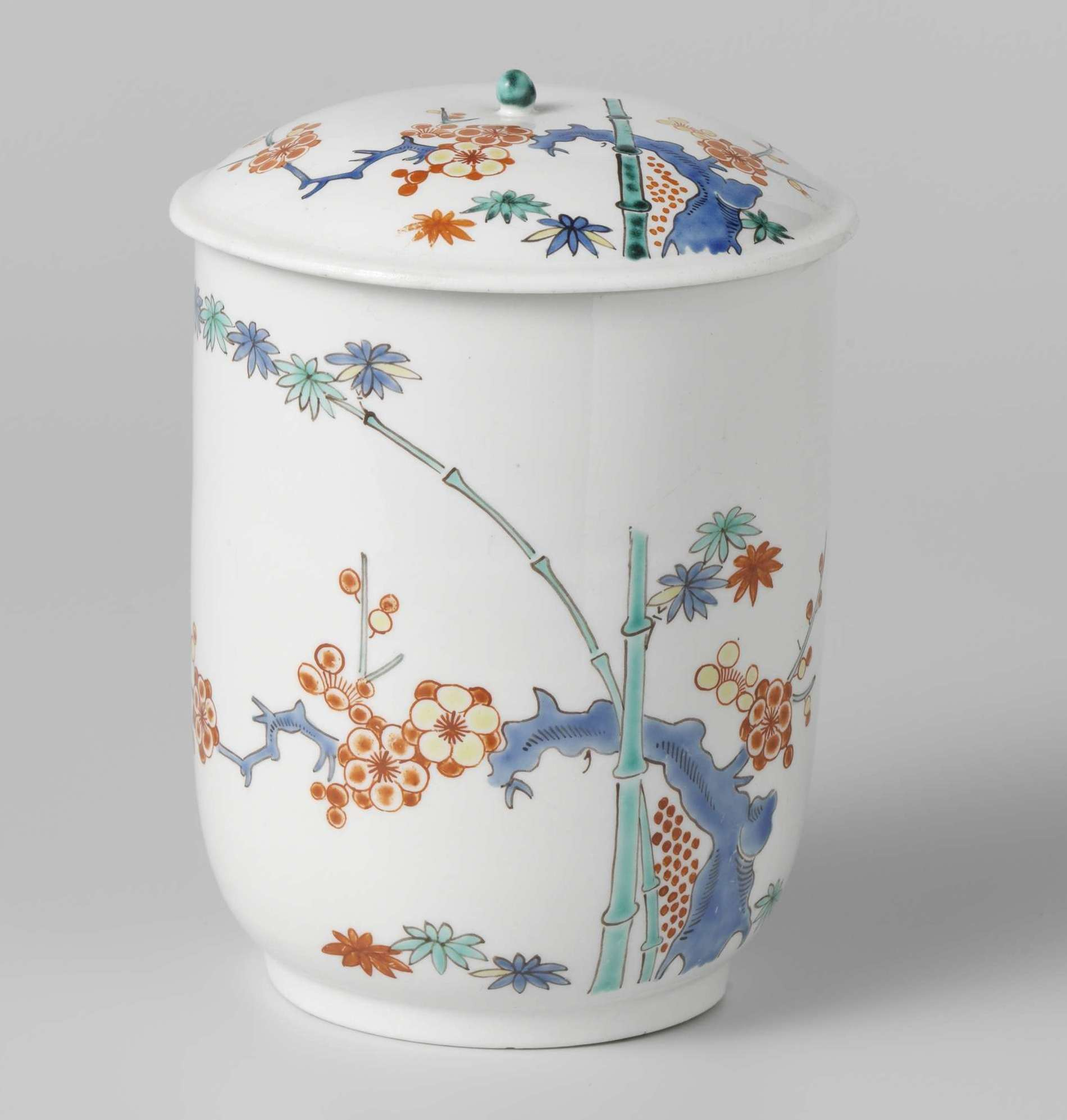 Deksel van porselein, beschilderd in blauw, rood, groen, geel en zwart met bamboe en prunus en twee vogels.. Kakiemon-decor. Met bijbehorende pot (A); vaatwerk; deksel